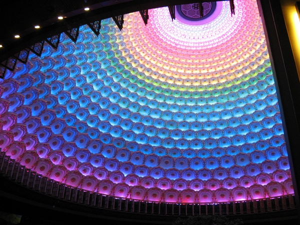 中国无锡灵山梵宫天顶